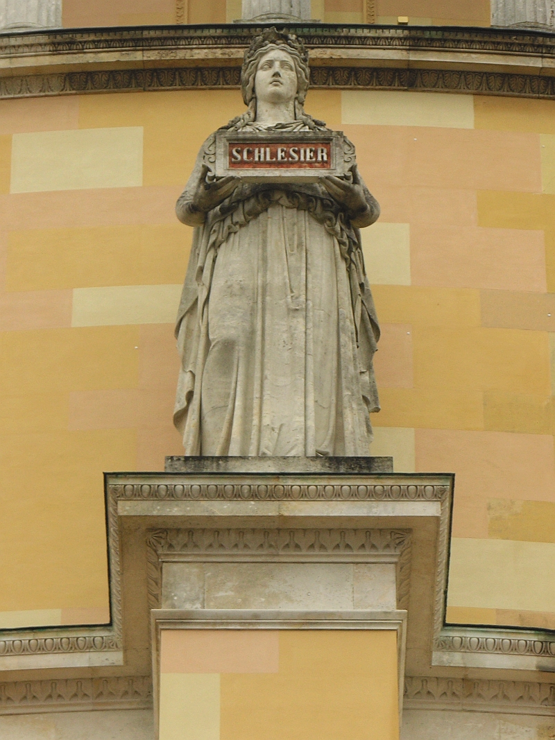 Diese Statue an der Aussenseite der Befreiungshalle in Kelheim steht für den Volksstamm der Schlesier, Höhe der Statue 580 cm. Sie ist eine von 18 Statuen, die nach Modellen des Bildhauers Johann Halbig geschaffen wurden.